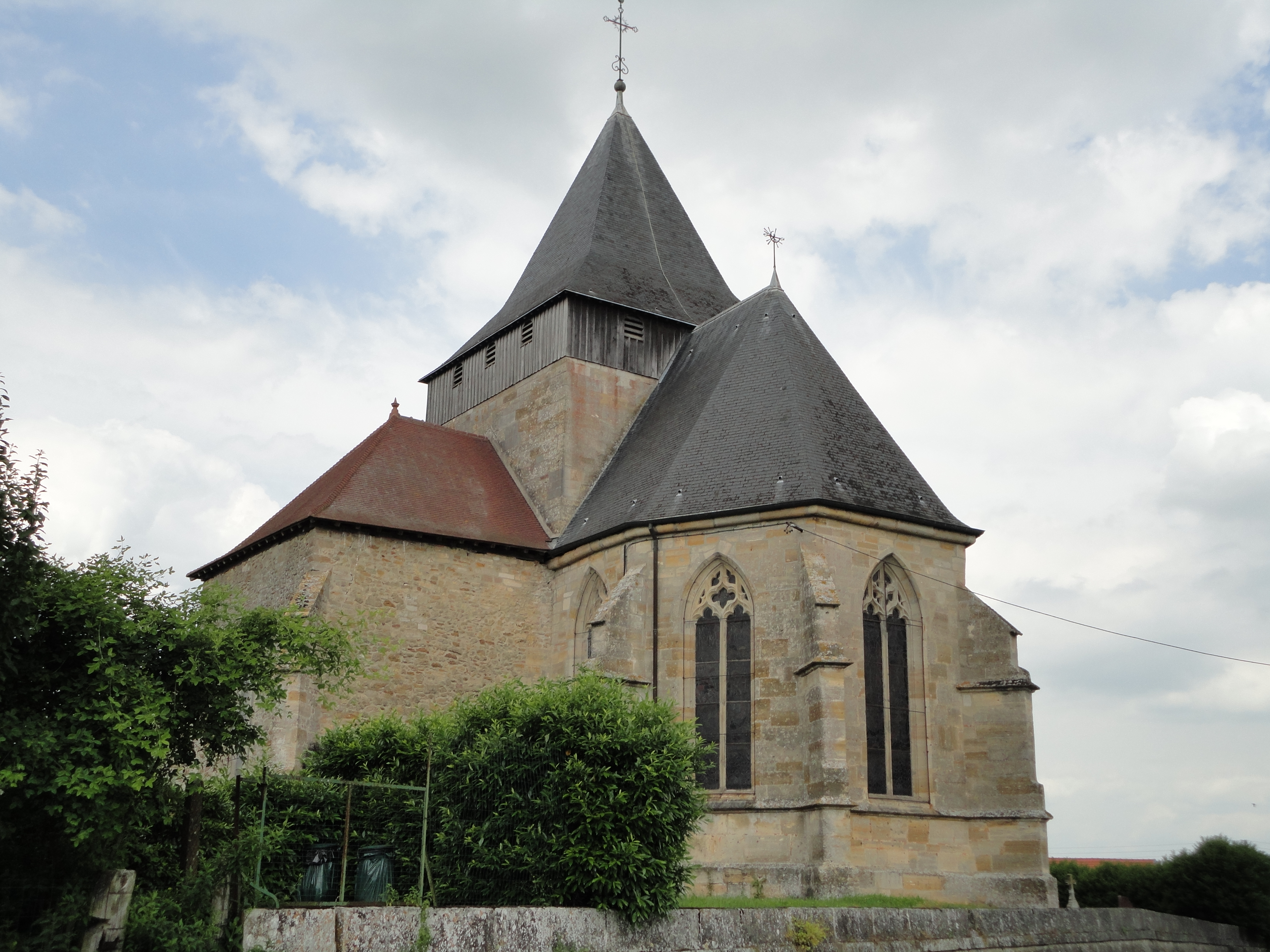 Photographie de l'église d'Étrepy, Marne, France.